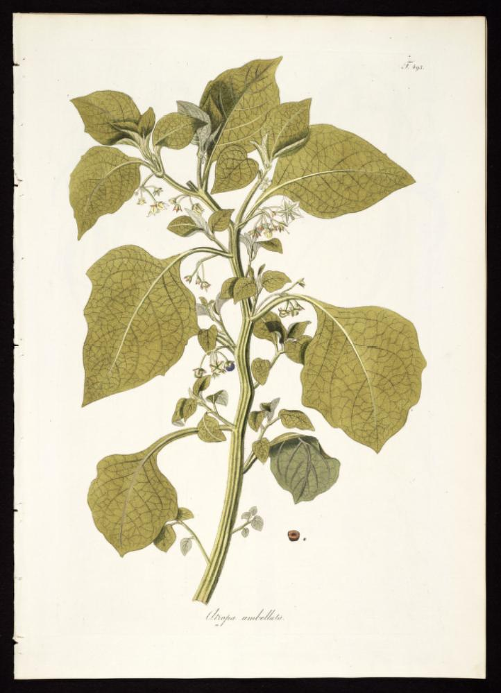 Illustration of Jaltomata umbellata (Orig. Atropa umbellata)